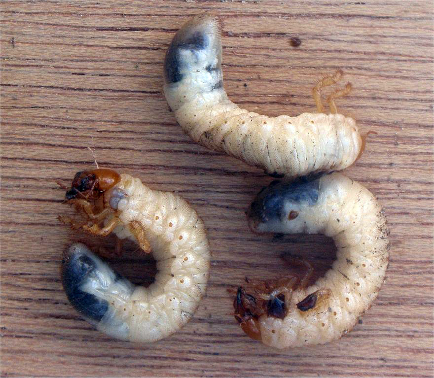 Engerlingen van de meikever) (Melolontha melolontha larvae